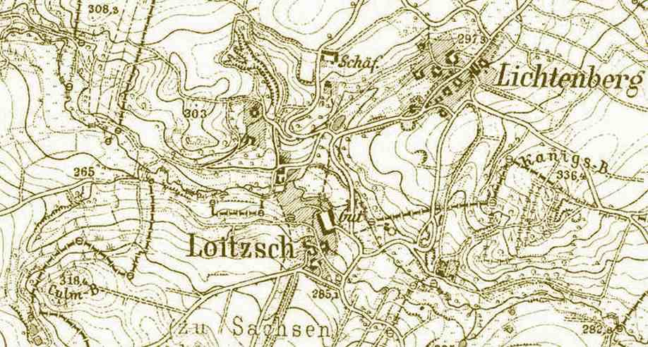 Ausschnitt mit Darstellung der Orte Leutzsch und Lichtenberg.